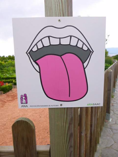 Parque de los Sentidos (Noáin, Navarra)